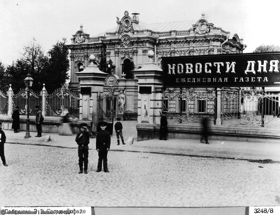 Moscow newspaper "News of the Day" 1900